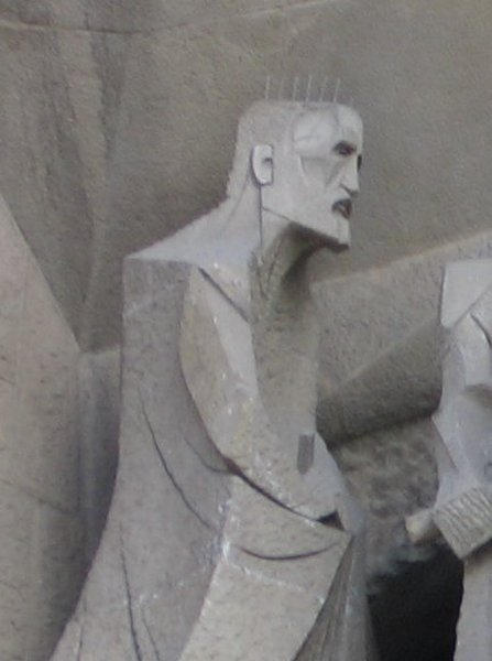 Imagen de Gaudí en La Verónica, en la fachada de la Pasión de la Sagrada Familia, obra de Josep Mª Subirachs